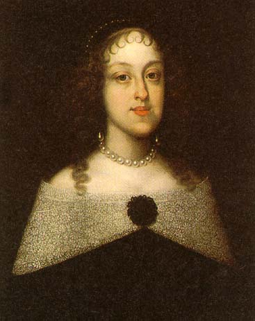 Erzherzogin Isabella Clara, Tochter von Leopold V.